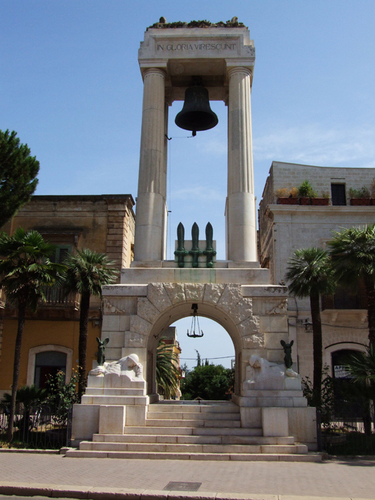 monumento ai caduti di sannicandro di bari